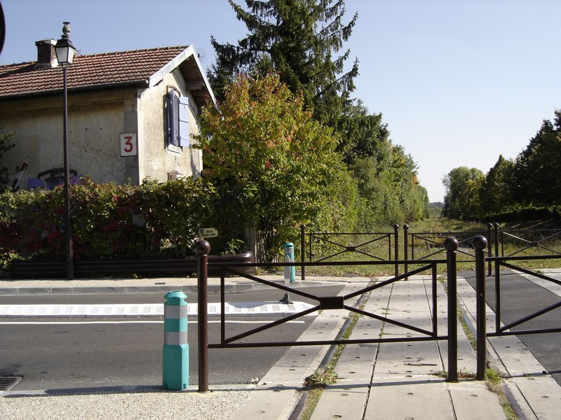 Halte-gare de Bailly et les voies de la ligne ferroviaire de Grande-Ceinture (tronçon désafecté).